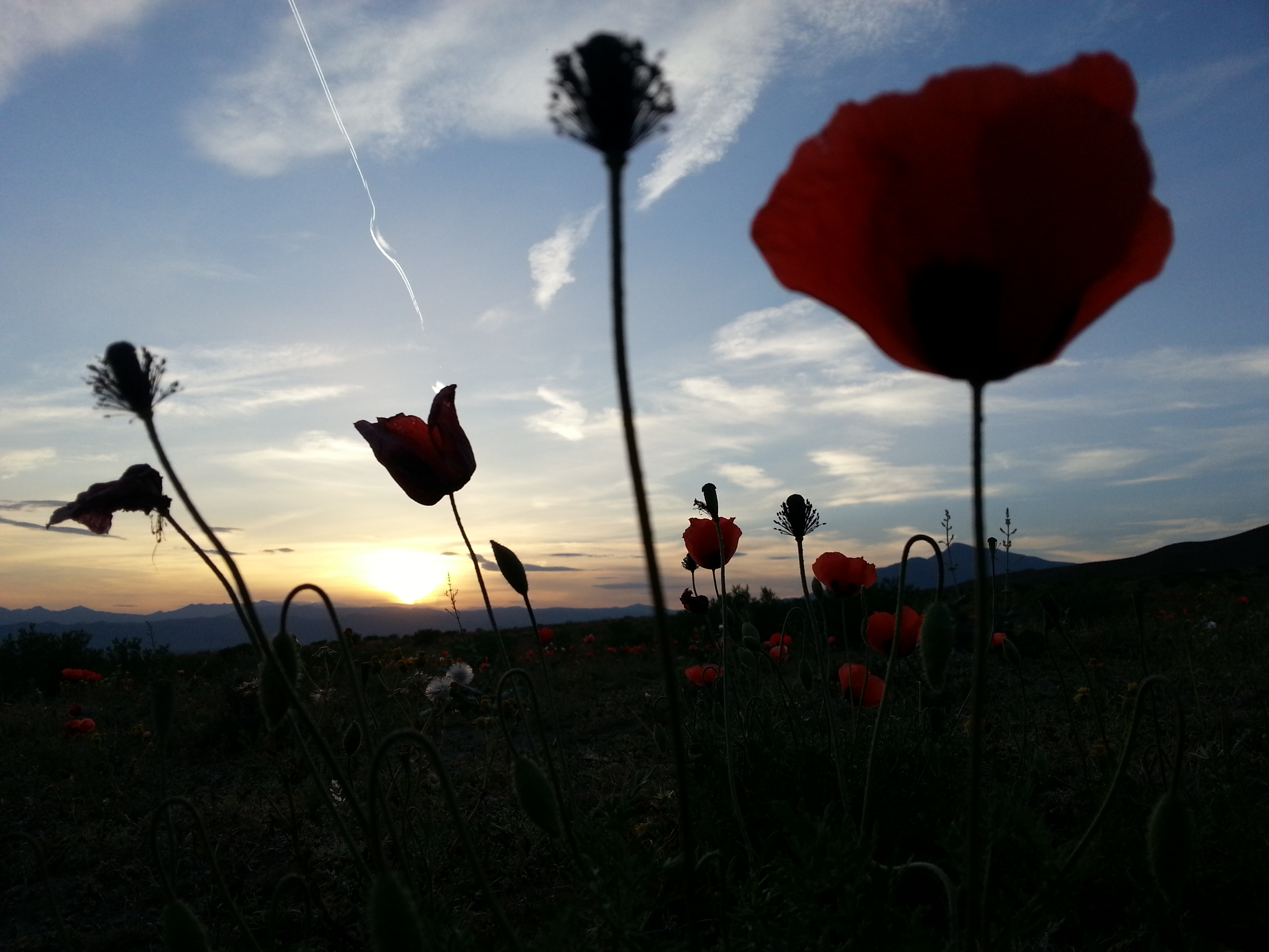 روستای نوایی_شهر خوی طبیعت بهاری